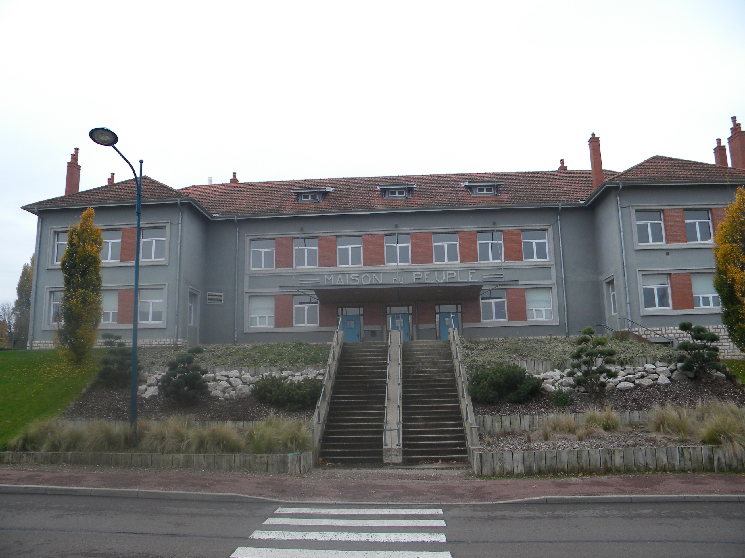 Maison du peuple à Chagny, Saône-et-Loire, le premier octobre 2009.